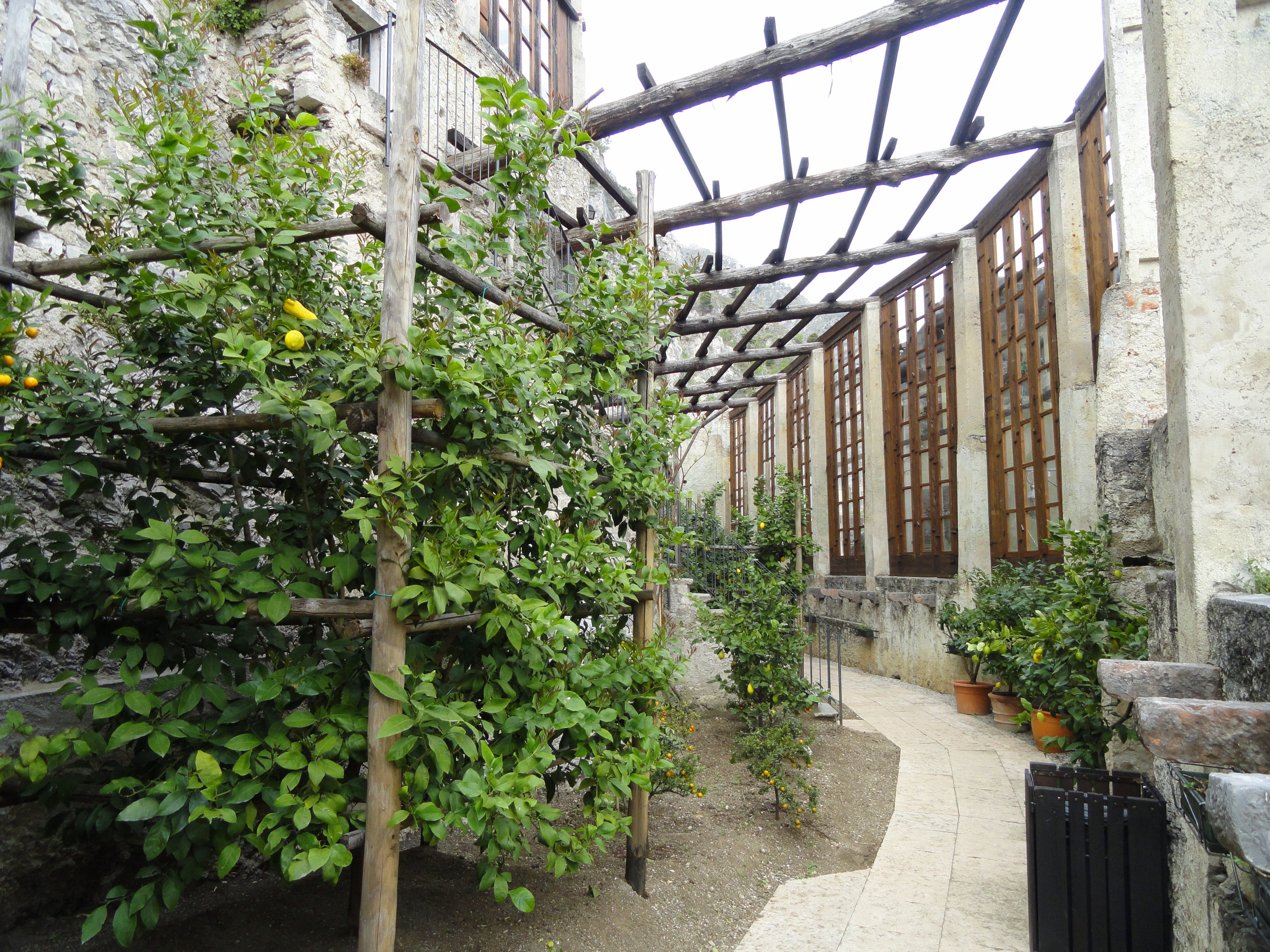 Limonaia del Castel, Limone sul Garda, on Lake Garda, Brescia, Italy.